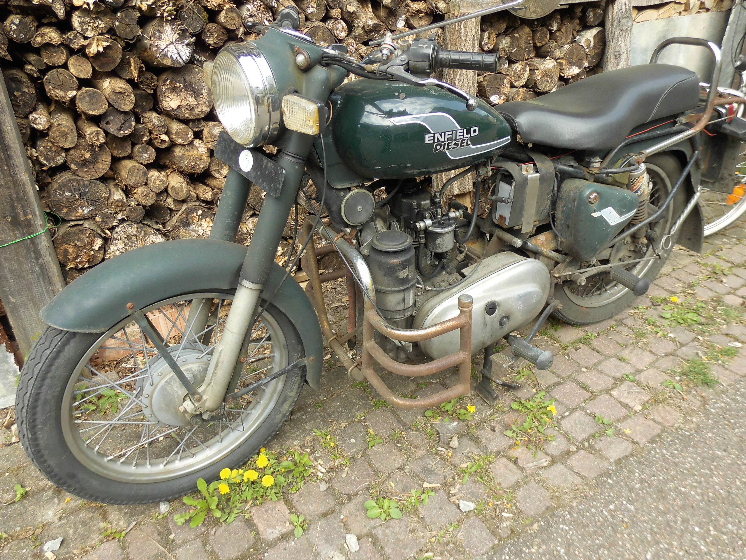 Zugelassene Enfield Diesel im Landkreis SHA